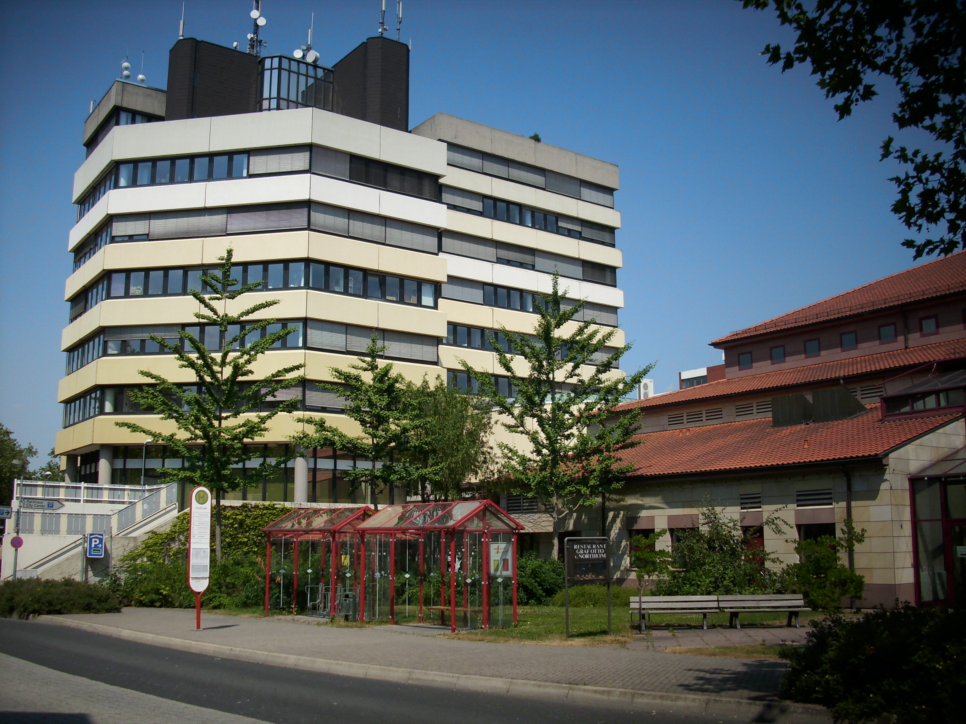 Die Kreisverwaltung des Landkreises Northeim in der gleichnamigen Stadt.